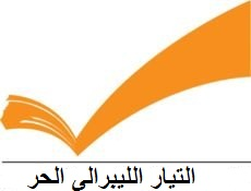 شعار التيار الليبرالى الحر